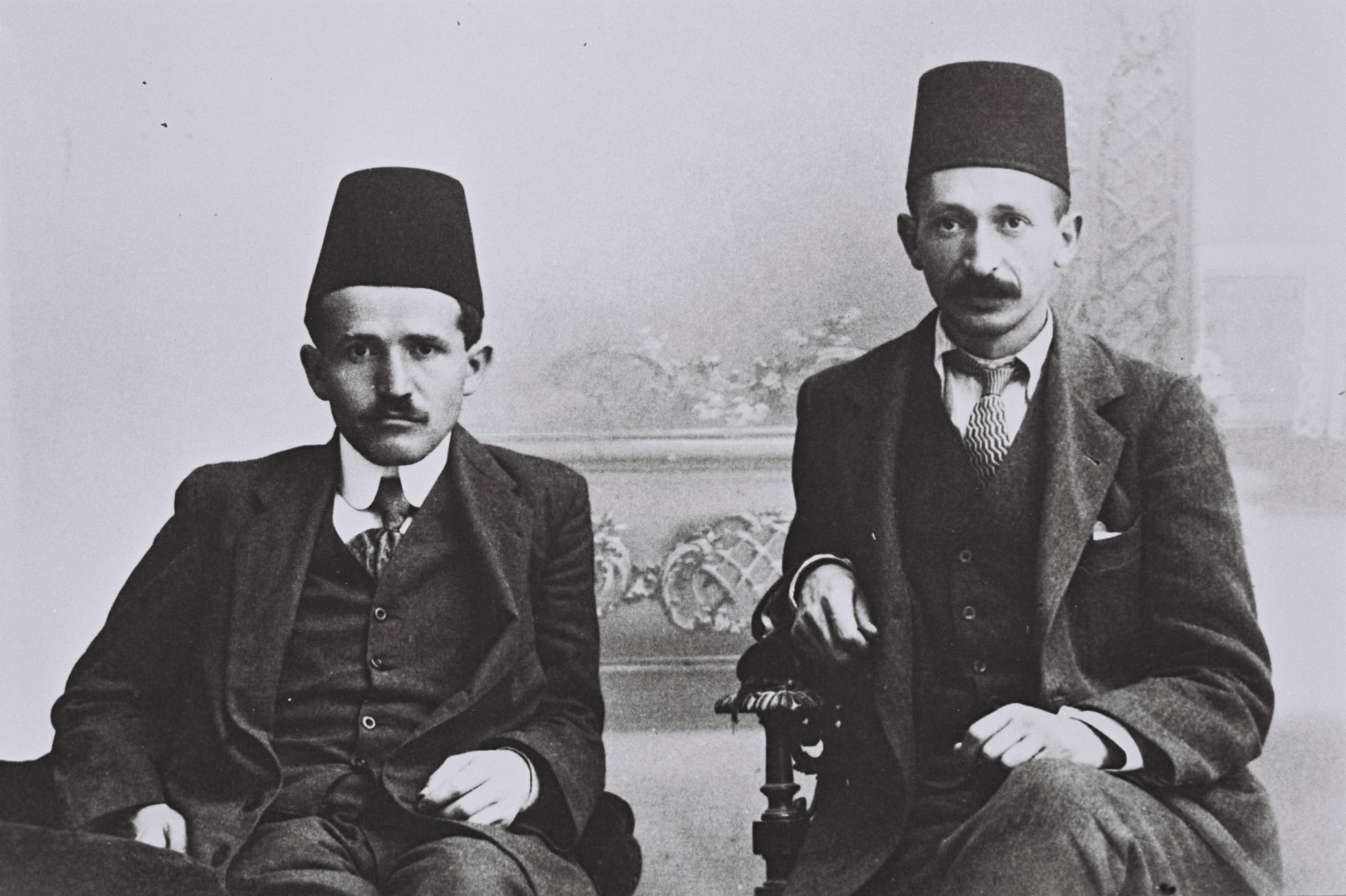 David Ben Gurion and Yitzhak Ben Zvi (R) As law students in Turkey. דוד בן גוריון (משמאל) ויצחק בן צבי, סטודנטים למשפטים בטורקיה. Photograph: GPO. 01/10/1912